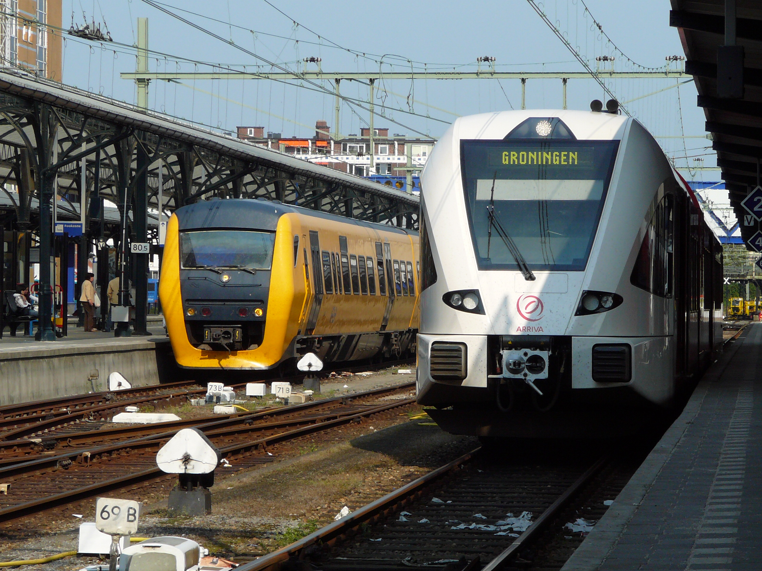 3414 Groningen - Zwolle, 304 Groningen - Leer, Groningen.